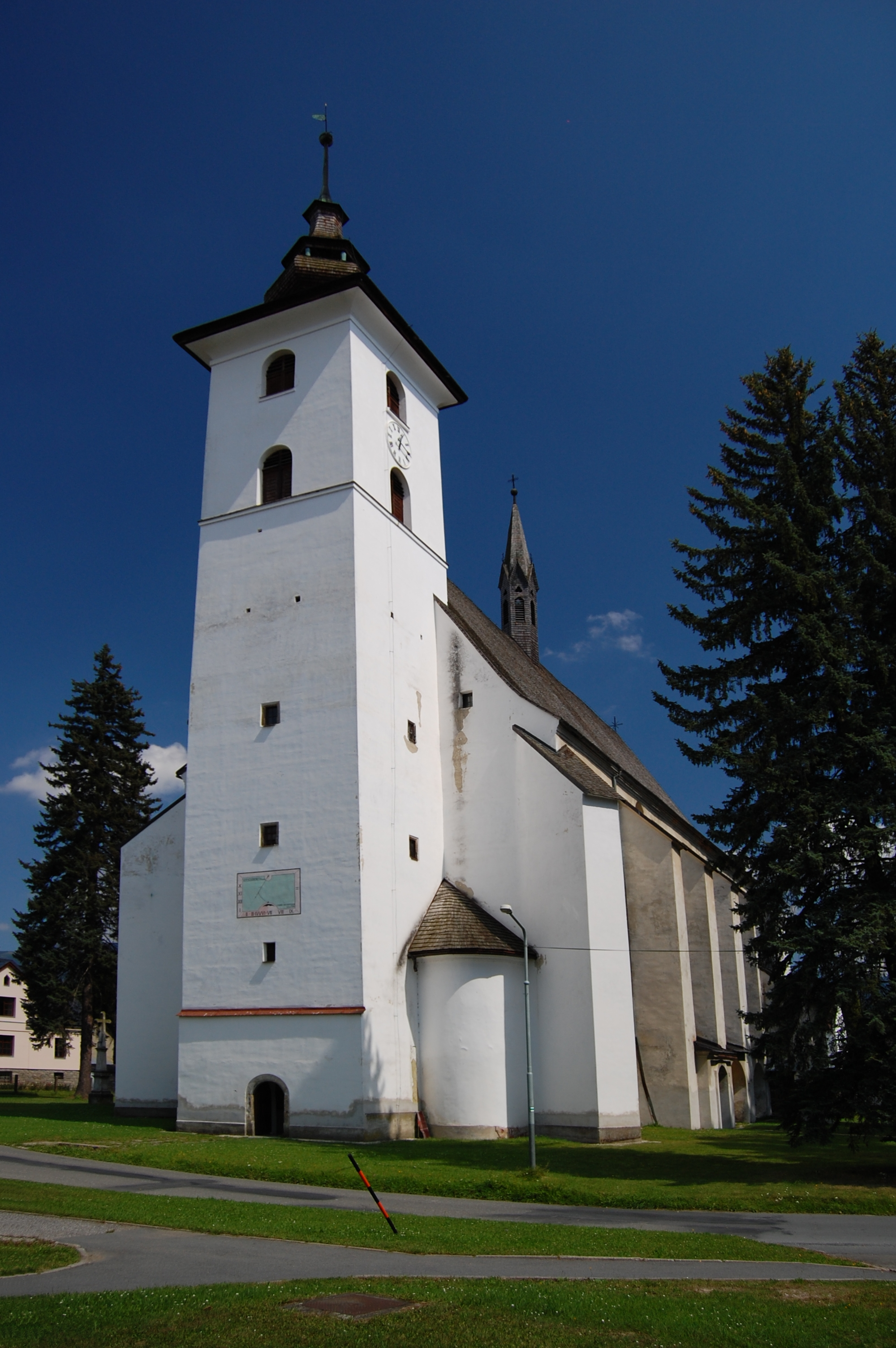 Kostel Svatého Jana Křtitele - čelní pohled, Velké Losiny, okres Šumperk